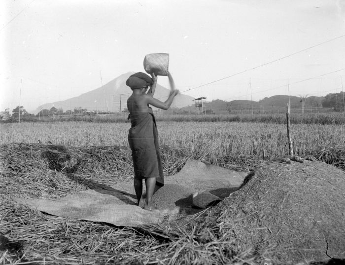 Negatief. Het wannen van rijst, Karolanden